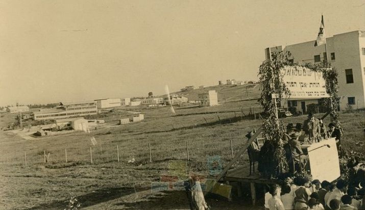 מראה העיר בני ברק באיזור האירוע של הנחת אבן הפינה בשכונת זכרון מאיר.